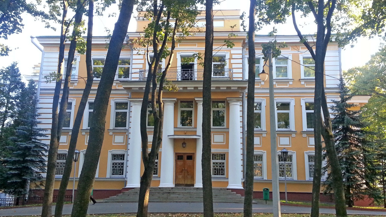 Беларуская (тарашкевіца): Будынак былога палаца губэрнатара. г. Віцебск This is a photo of Belarusian heritage monument. Reference number: 212Г000075 ( WLM)